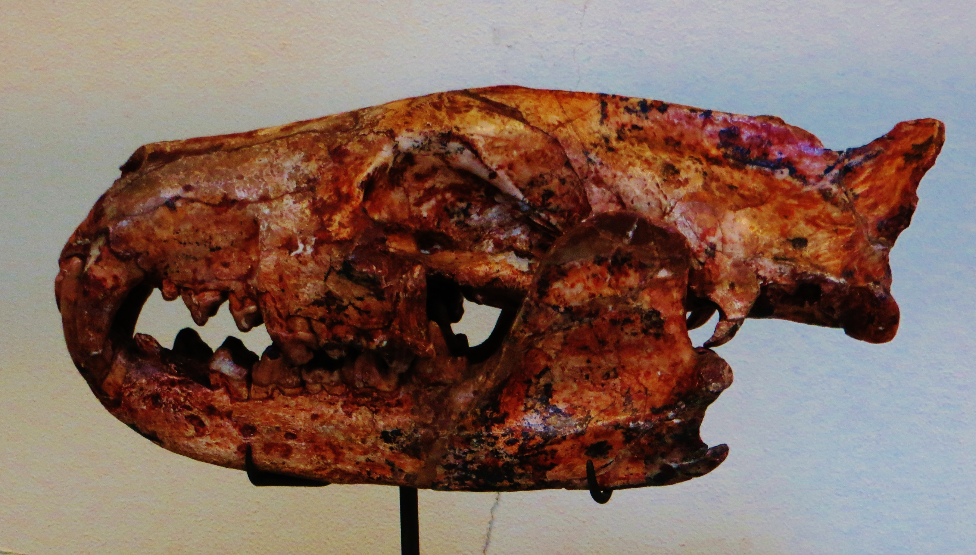 Fossil of Cynohyaenodon, an extinct mammal - Took the photo at Musee d'Histoire Naturelle, Paris